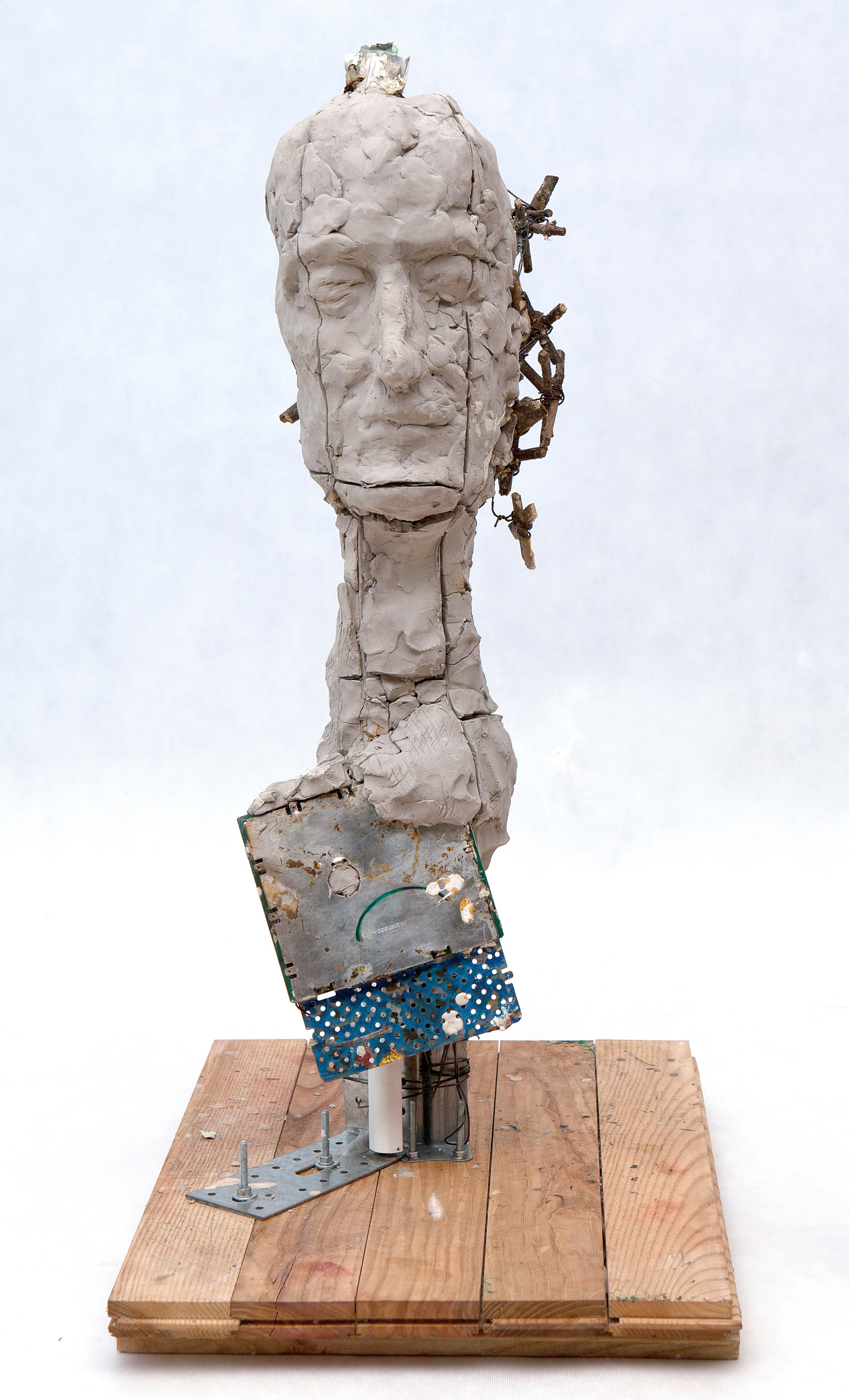 Rzeźba jest wynikiem współpracy w ramach warsztatu „Cześć Akademii” (2013) zainicjowanego przez Pawła Althamera i Artura Zmijewskiego, który odbył się na Akademii Sztuk Pięknych w Warszawie. Obaj artyści są znani z organizowania działań o charakterze wspólnotowym, przekraczających tradycyjne kwestie autorstwa dzieła, spójności mediów na rzecz działań kreujących choćby chwilową wspólnotę. Wciągają do swoich działań rozmaite środowiska, a swoje talenty plastyczne traktują jako narzędzie pomagające w mediacjach. Warsztat „Cześć Akademii” był wyzwaniem rzuconym szkole artystycznej, która ciągle kultywuje tradycyjne rzemiosło i poza drobnymi wyjątkami jest zamknięta na wszelkie radykalne idee, które zmieniły sztukę współczesną. Jednocześnie celem przedsięwzięcia było ujawnienie, pokazanie warsztatu tradycyjnego artysty, podkreślenie raczej żmudnego procesu niż gotowego produktu. Prezentowaną rzeźbę artyści wykonali wspólnie ze swoim kolegą z czasów akademii Romanem Stańczakiem oraz nauczycielem z pierwszych lat studiów Gustawem Zemłą (ur. 1931 w Jasienicy Rosielnej). Szczególnie konfrontacja z dawnym pedagogiem, zwolennikiem tradycyjnego rozumienia rzeźby oraz autorem wielu oficjalnych pomników, jest interesująca. Rzeźbie towarzyszy film, który dokumentuje proces powstawania obiektu, ale i spotkanie po latach różnych artystycznych postaw.